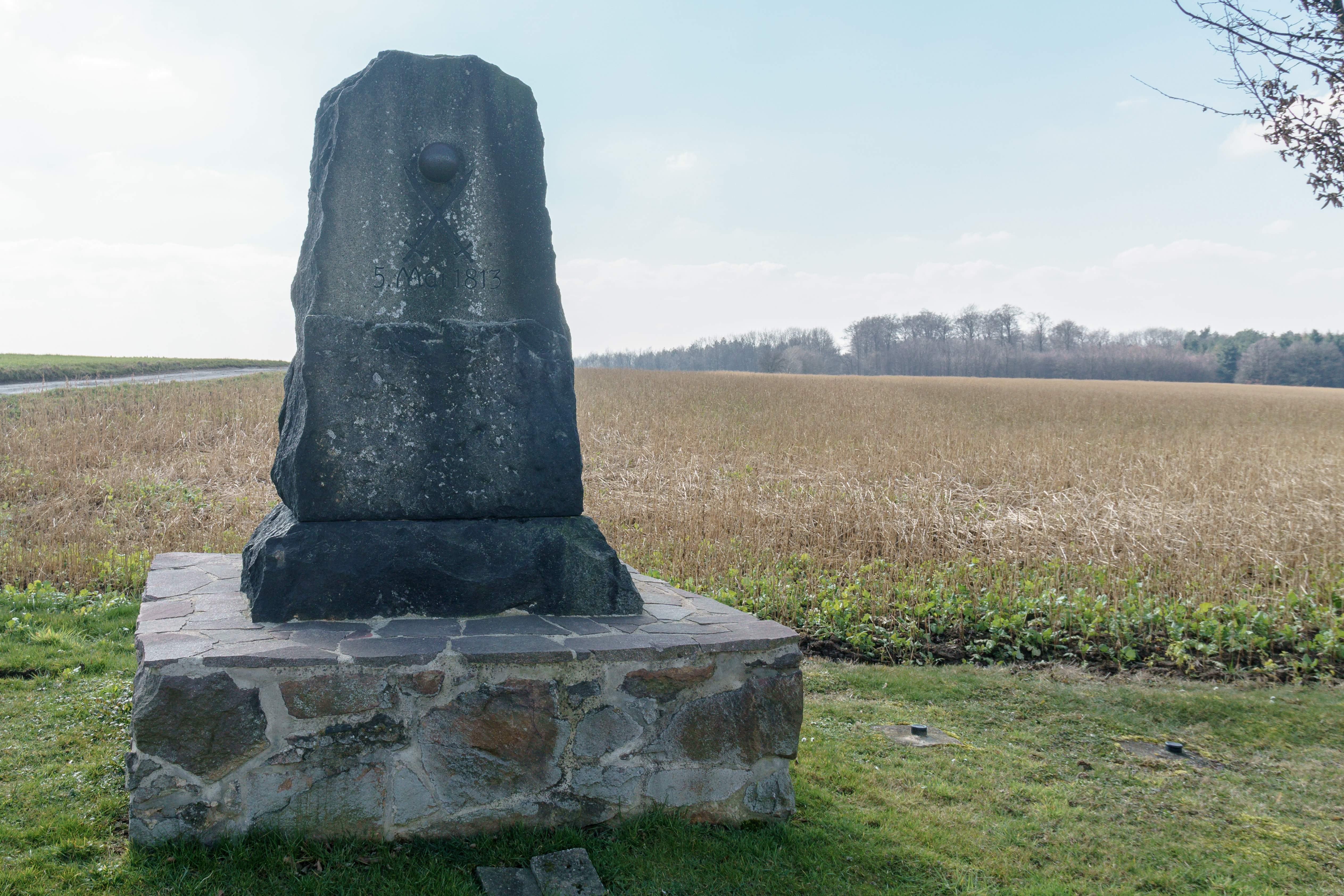 Denkmal Gefecht bei Gersdorf - 5. Mai 1813 Text: 5. Mai 1813, darüber gekreuzte Schwerter und eingelassene Kanonenkugel, aufgestellt am 5. März 1913.